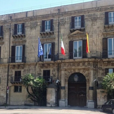 Ingresso principale di Palazzo d'Orléans, sede della Presidenza della Regione siciliana